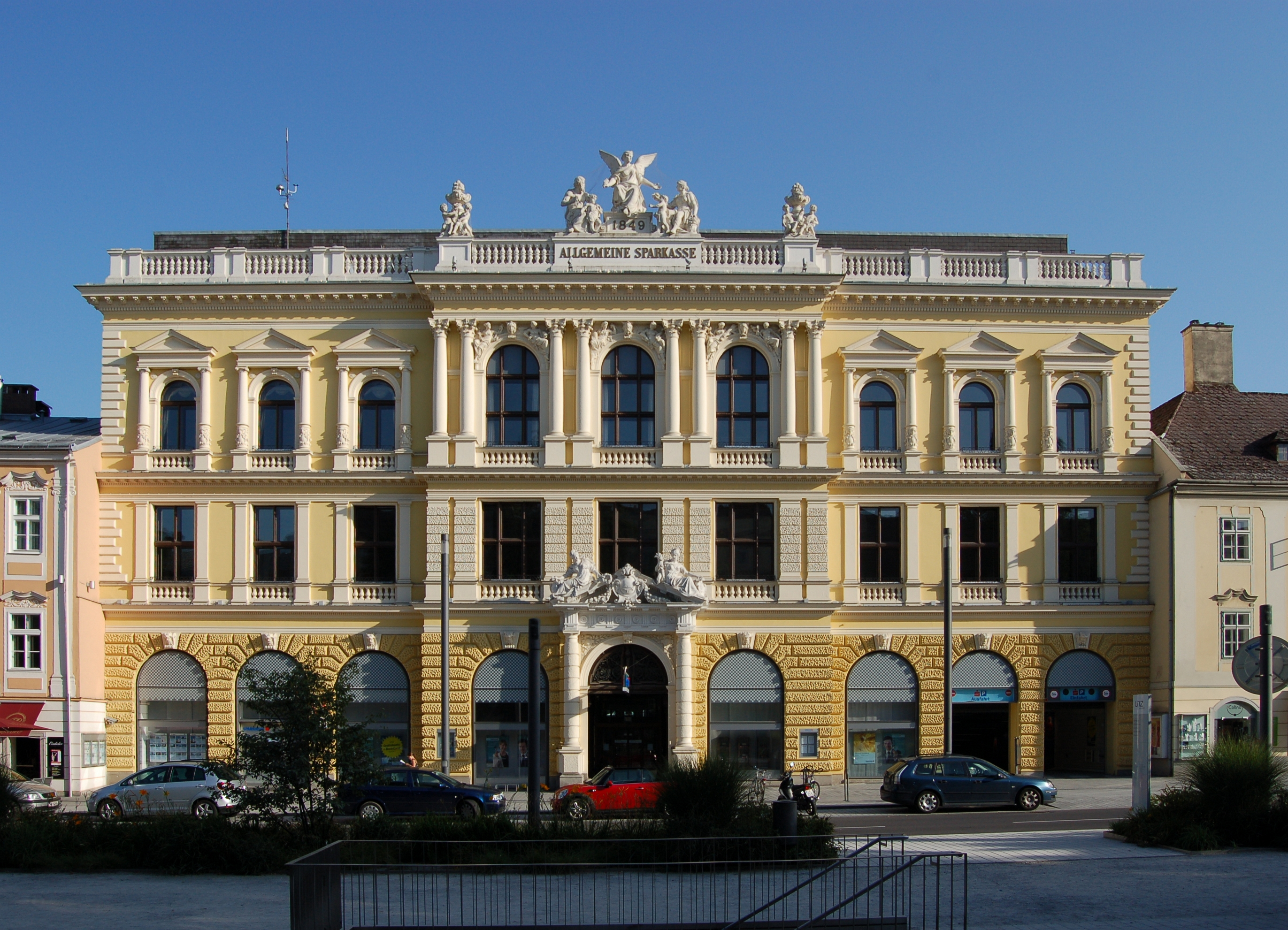 Das Bankgebäude der Allgemeinen Sparkasse in der Promenade 11-13 in Linz.